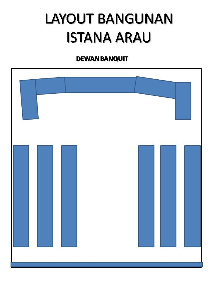 DEWAN BANKUIT